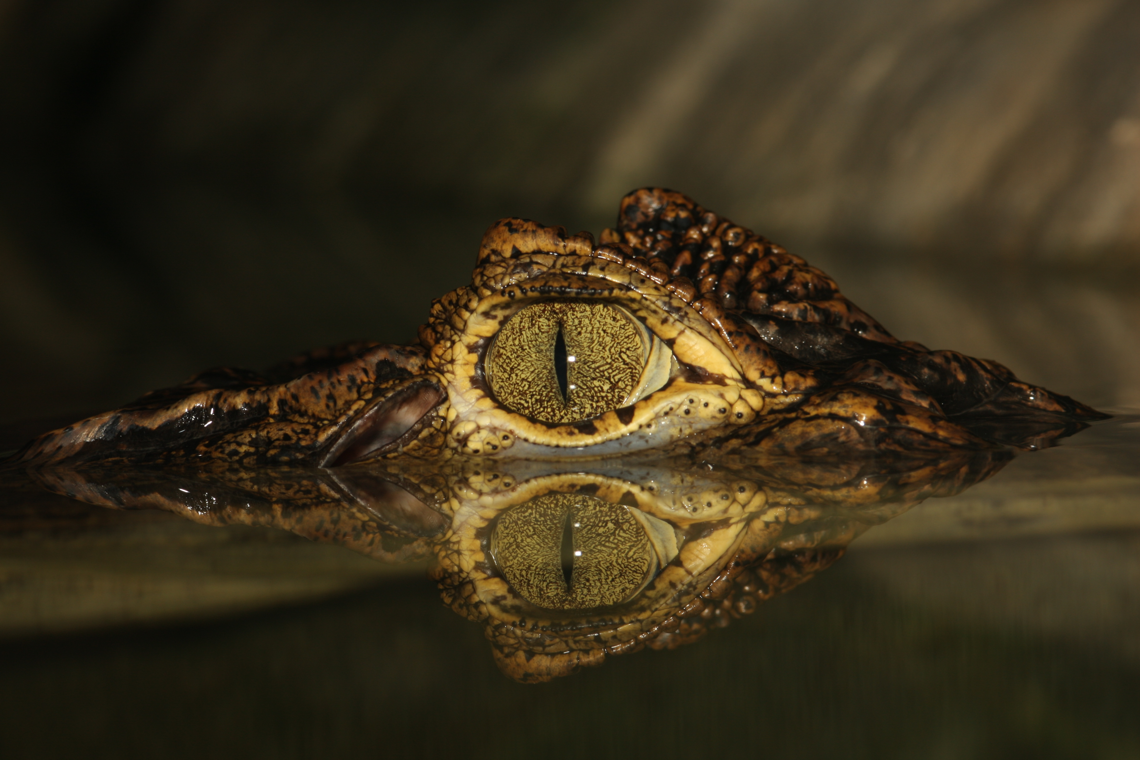 Brillekaiman i Oslo Reptilpark